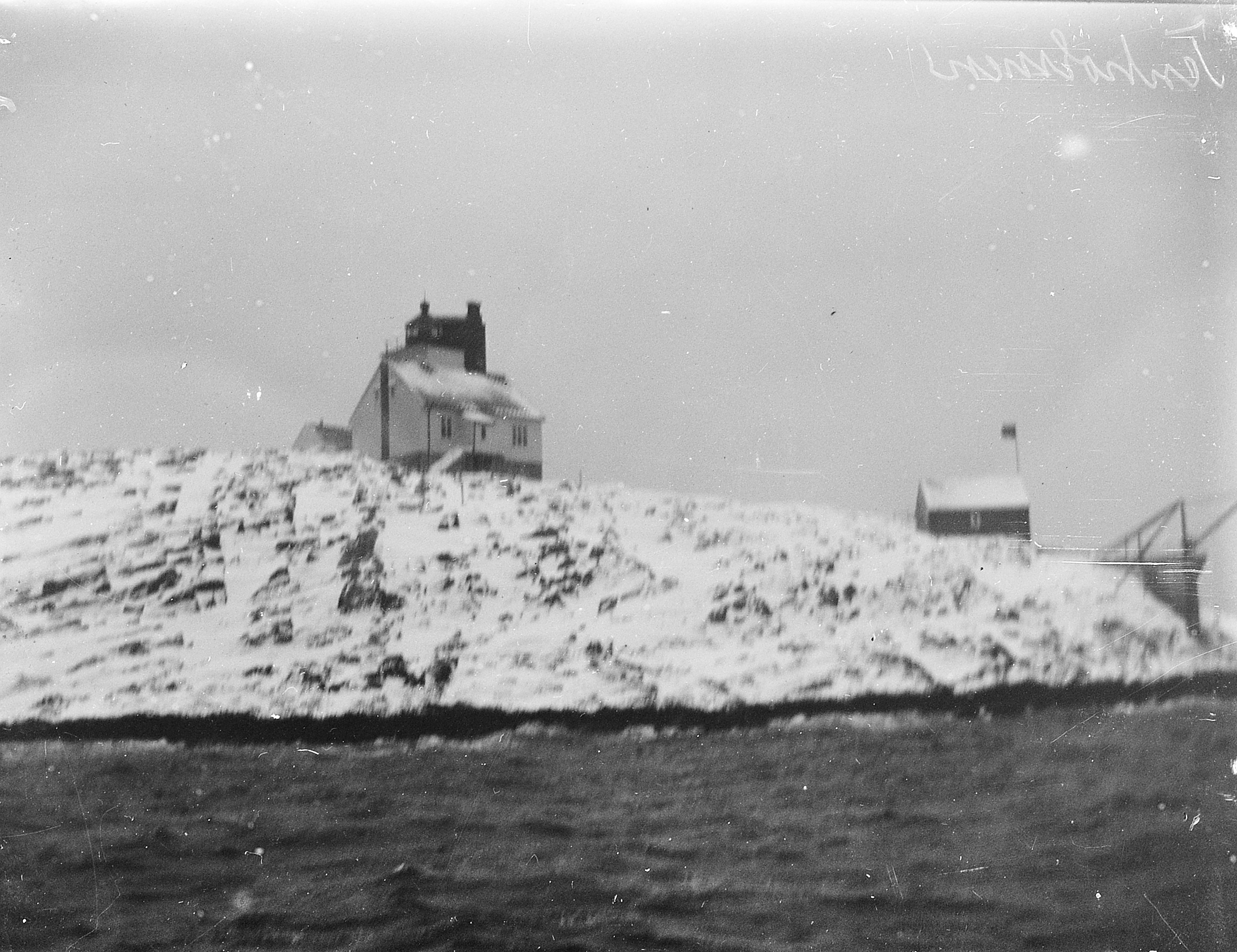 Bildet er hentet fra Arkivverket. Tennholmen, Bodø Arkivinstitusjon : Riksarkivet Arkivnavn : Fyrdirektoratet Sted : Norge, Nordland, Bodø, Emneord: Fyr, Kyst Avbildet